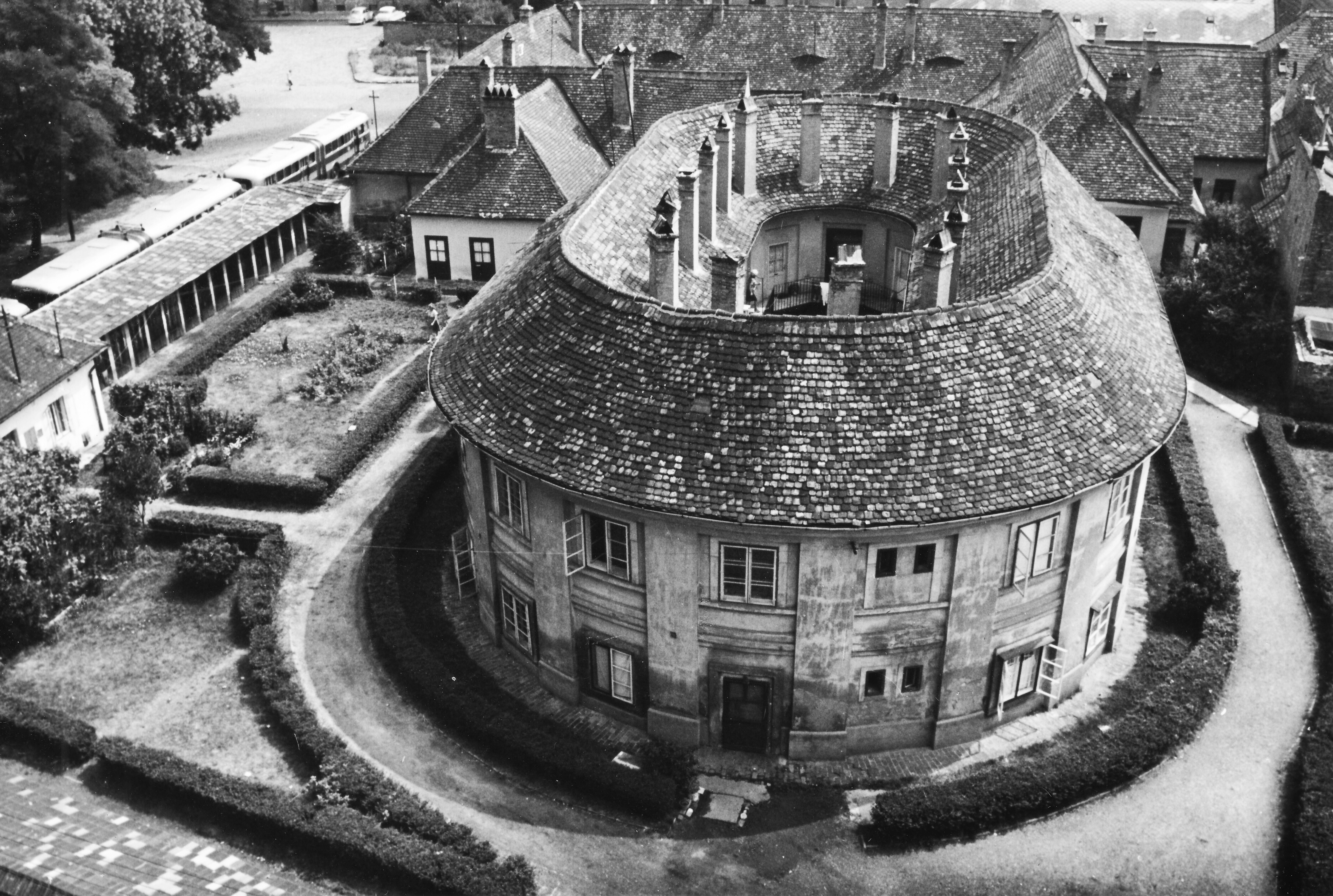 Budapest III. Óbuda, Miklós tér, Selyemgombolyító.